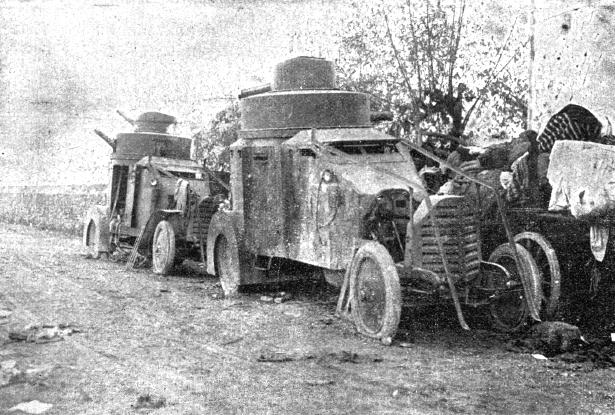 Oklopni avtomobili, ki so obtičali na cesti za italijansko bežečo vojsko in postali plen Nemcev